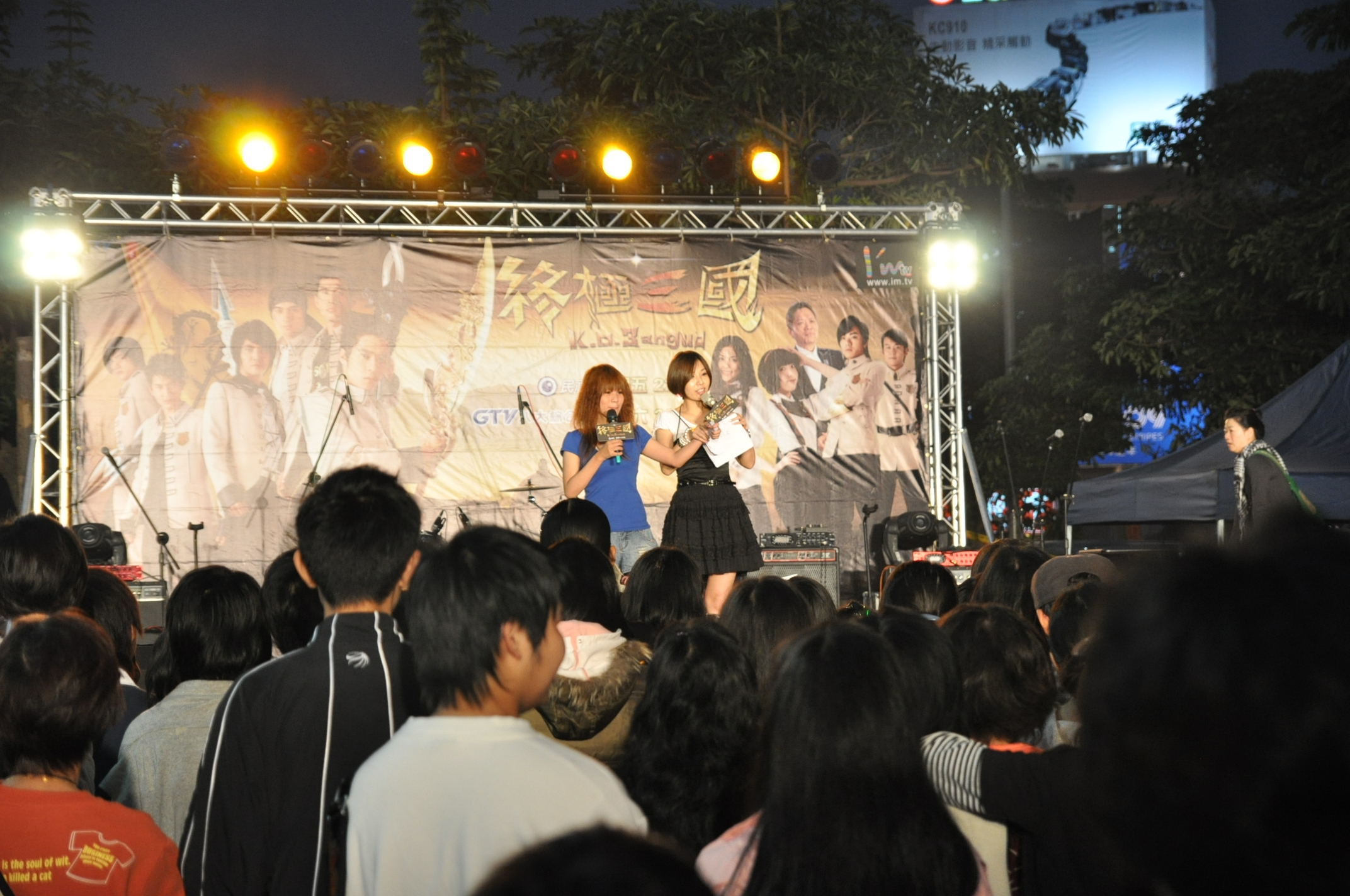 臺北市士林區晚間，八大電視及民間全民電視公司偶像劇《終極三國》影友會。